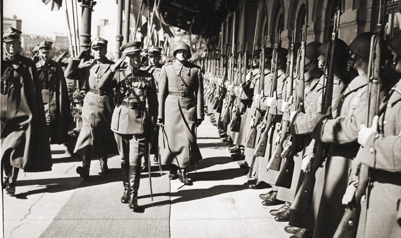 Powitanie naczelnego dowódcy armii litewskiej gen. Stasysa Rasztikisa na Dworcu Wschodnim - przejście przed frontem kompanii honorowej. Widoczni od lewej: marszałek Edward Śmigły-Rydz, NN, gen. Tadeusz Kasprzycki, gen. Rasztikis.